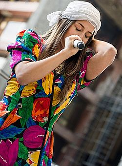 Show no Chile em Novembro de 2013